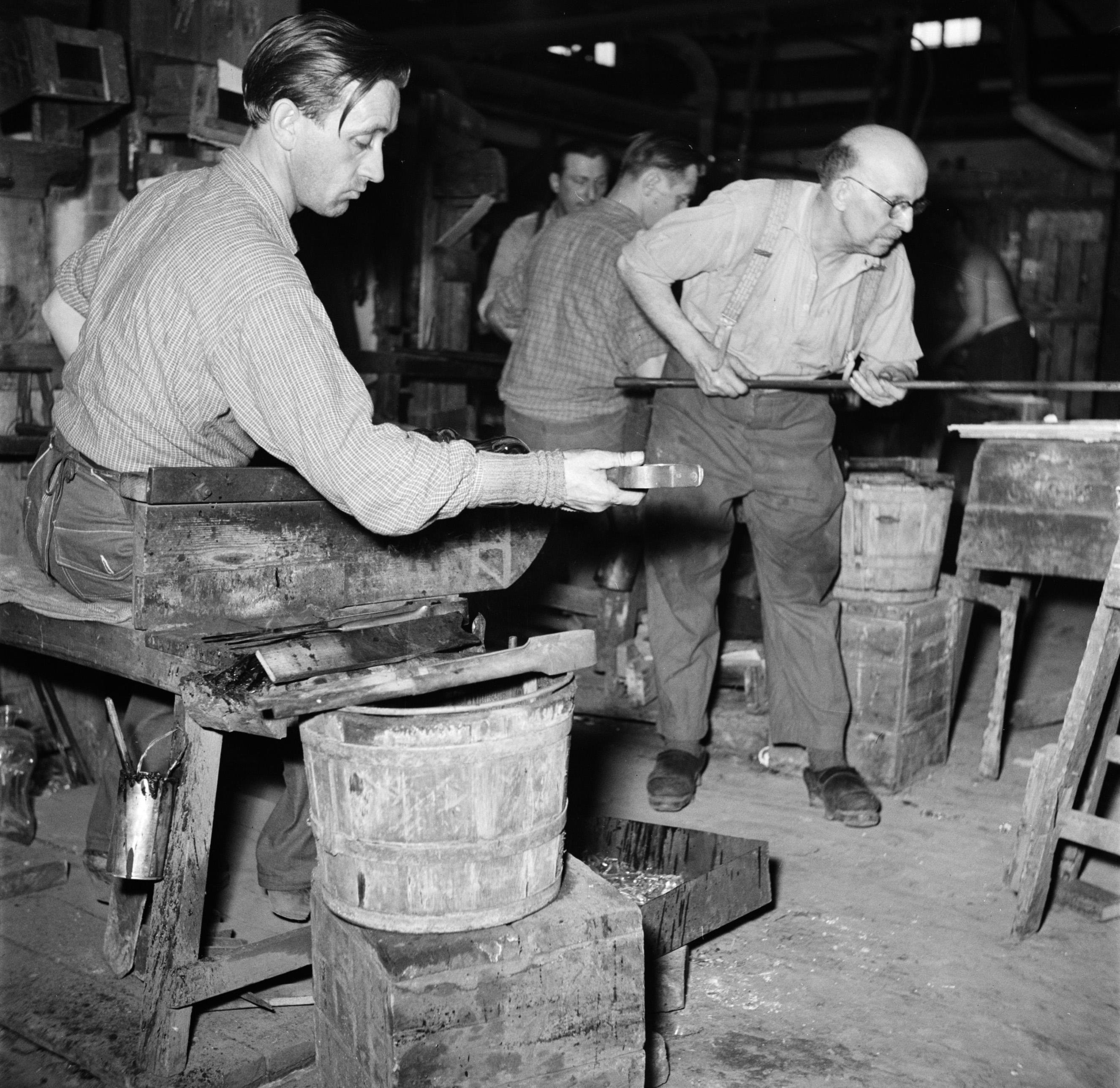 In de Holmegaard Glasfabriek. Glasblazers aan het werk in de fabriek, maart 1954.